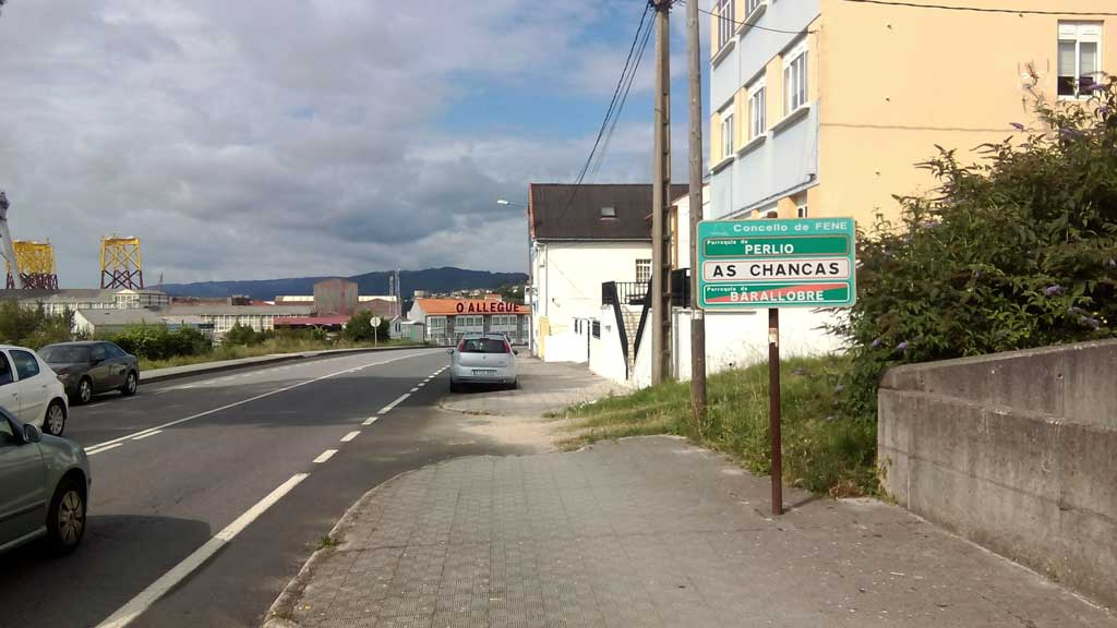 Vista das Chancas, Fene.